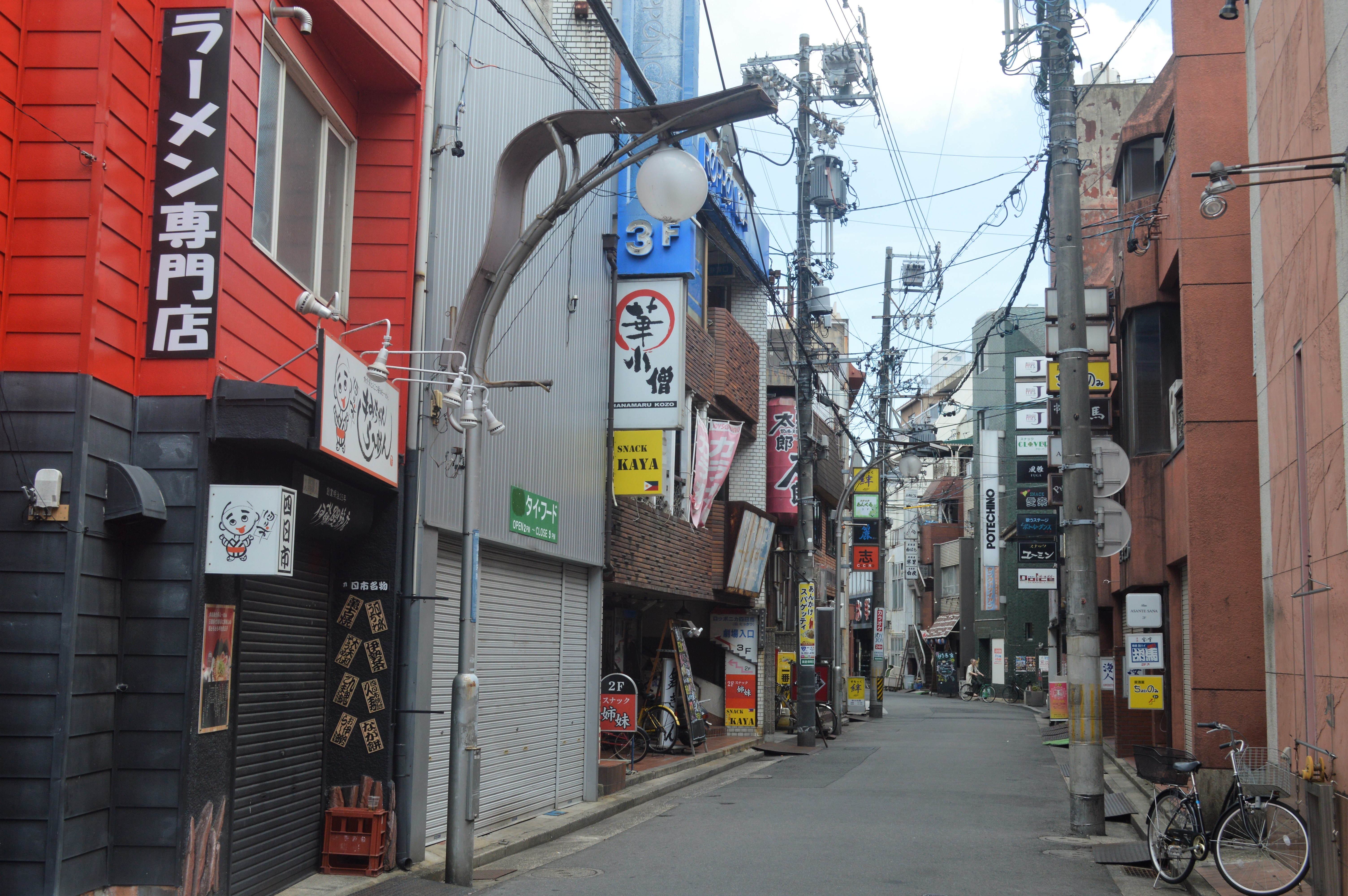 四日市市諏訪栄町にある四日市諏訪西商店街。諏訪ビル（きみちゃんラーメン）や大鯛ビル（ロッポニカ四日市や華〇小僧）などが見えている。